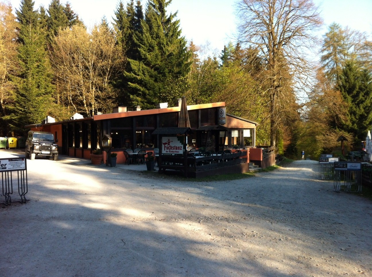 Waldgasthaus Fuchstanz